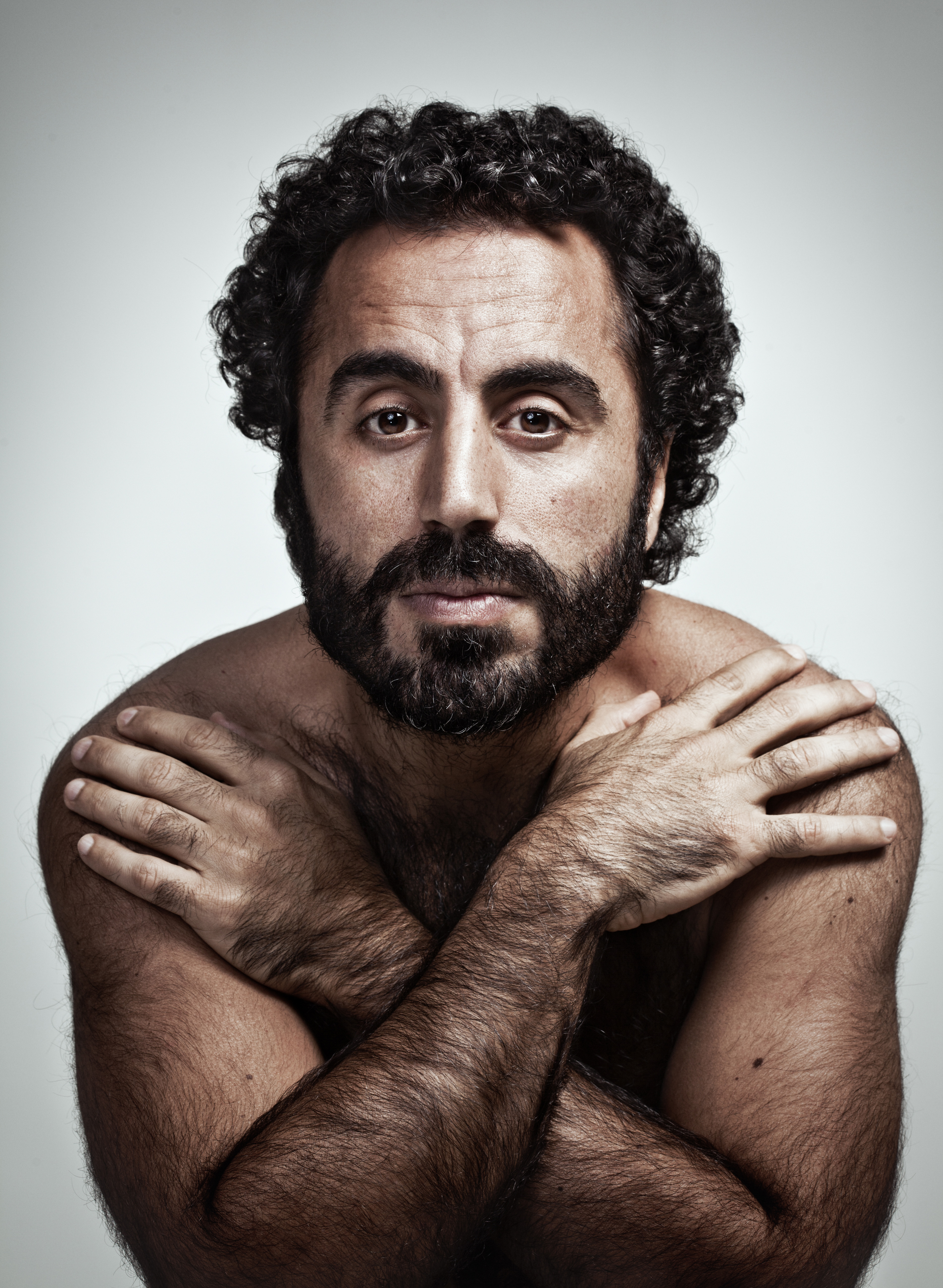 Komikern Özz Nûjen.